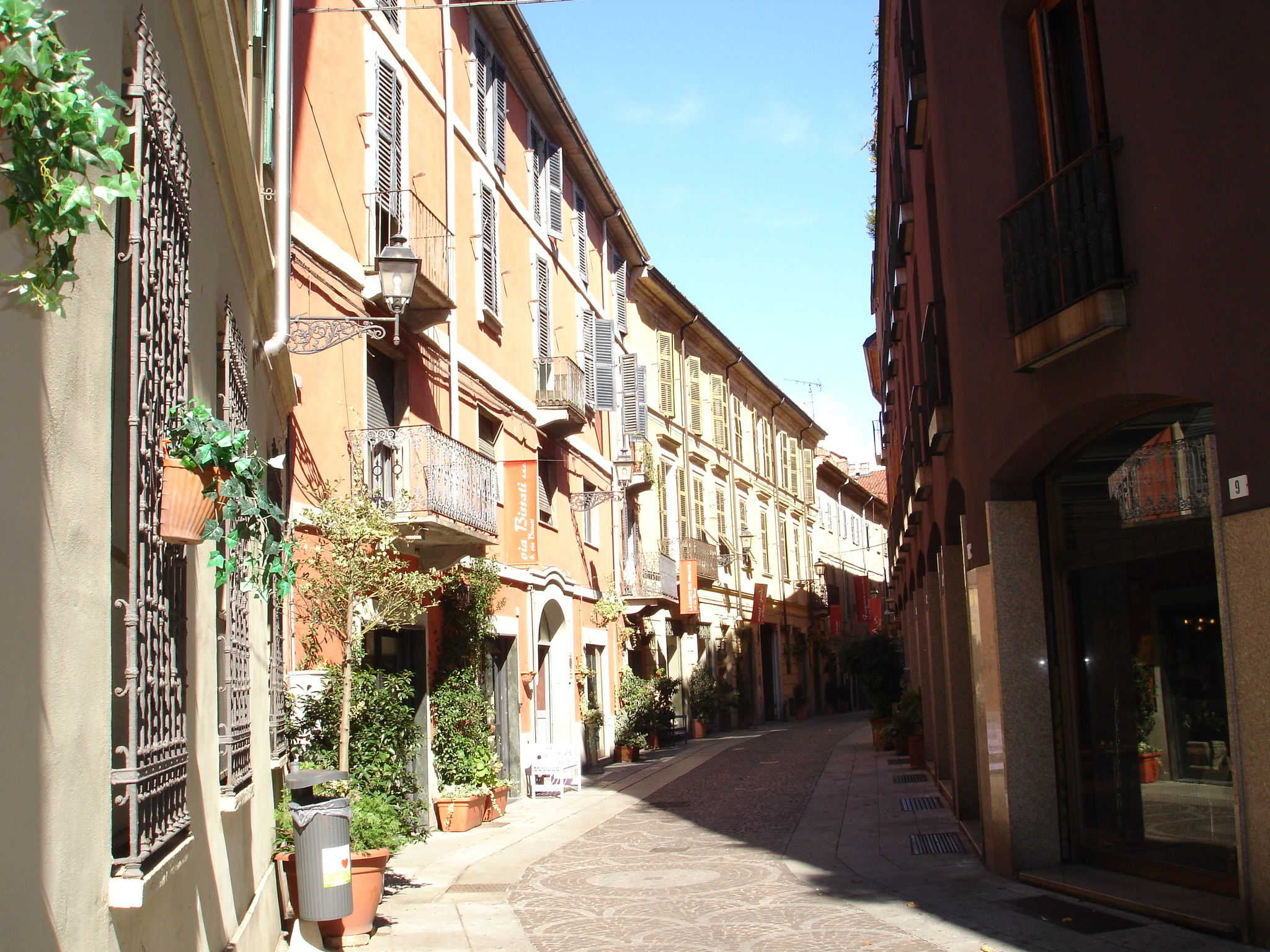 Aurore: Tony Frisina